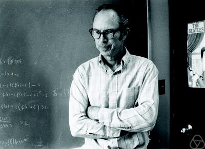 Foto di Robert Phelps